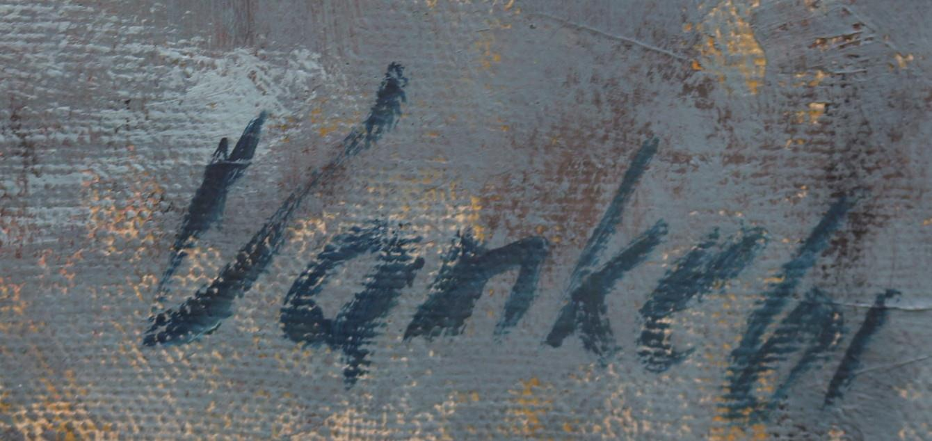 signatura obrazu